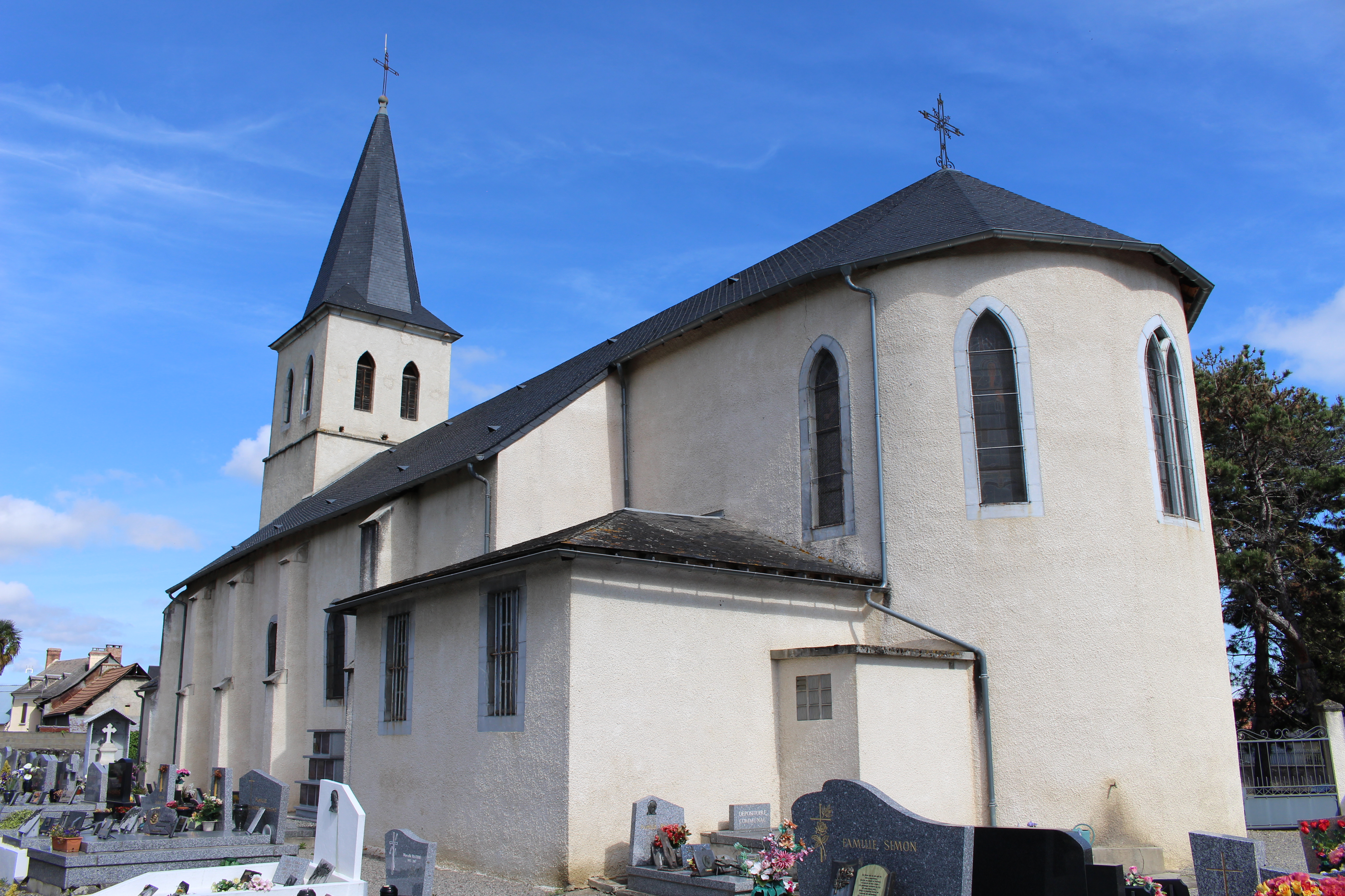 Église Saint-Christophe de Momères (Hautes-Pyrénées)